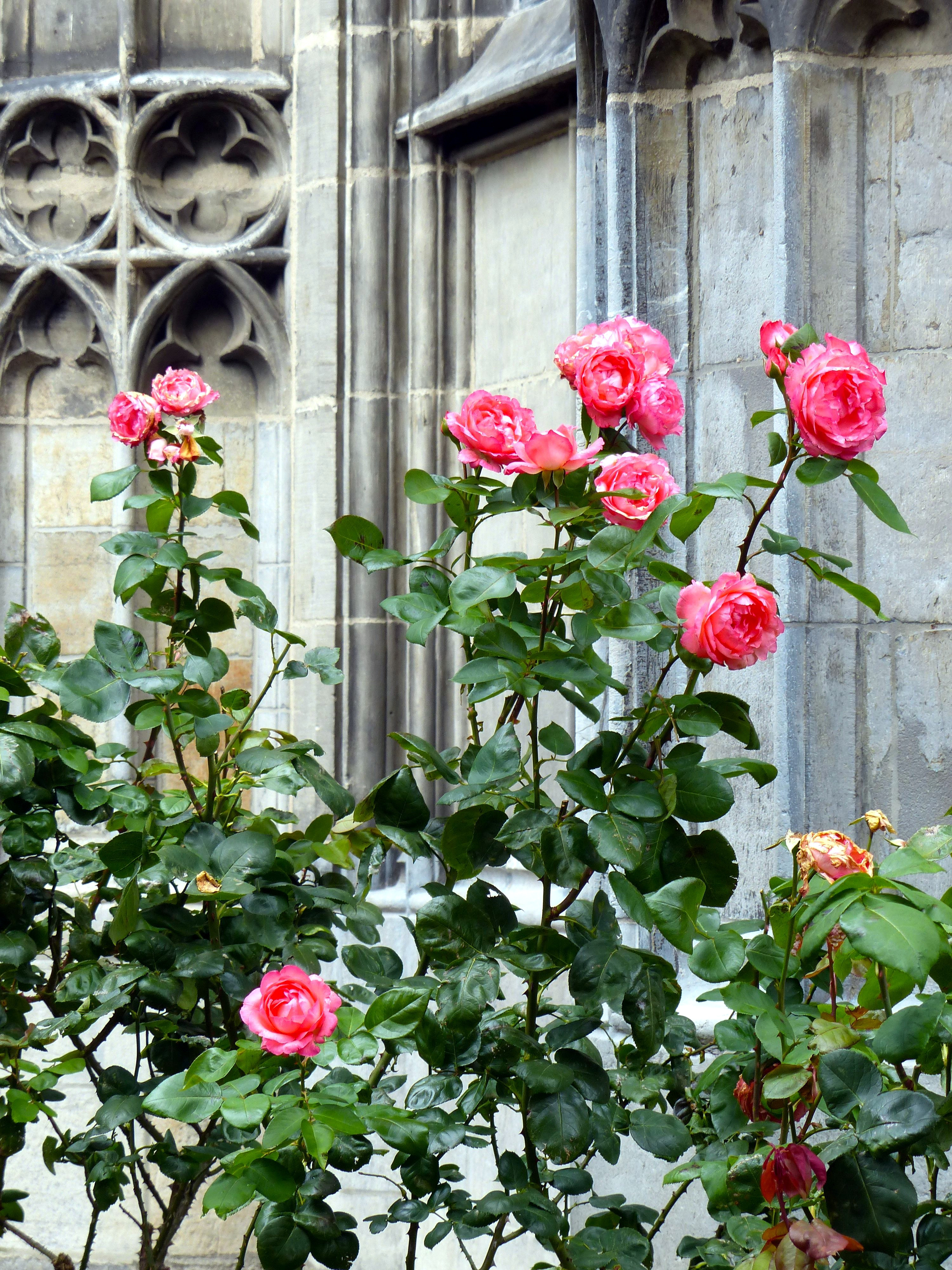 Die Rose "Aachener Dom" vor der Annakapelle des Aachener Domes